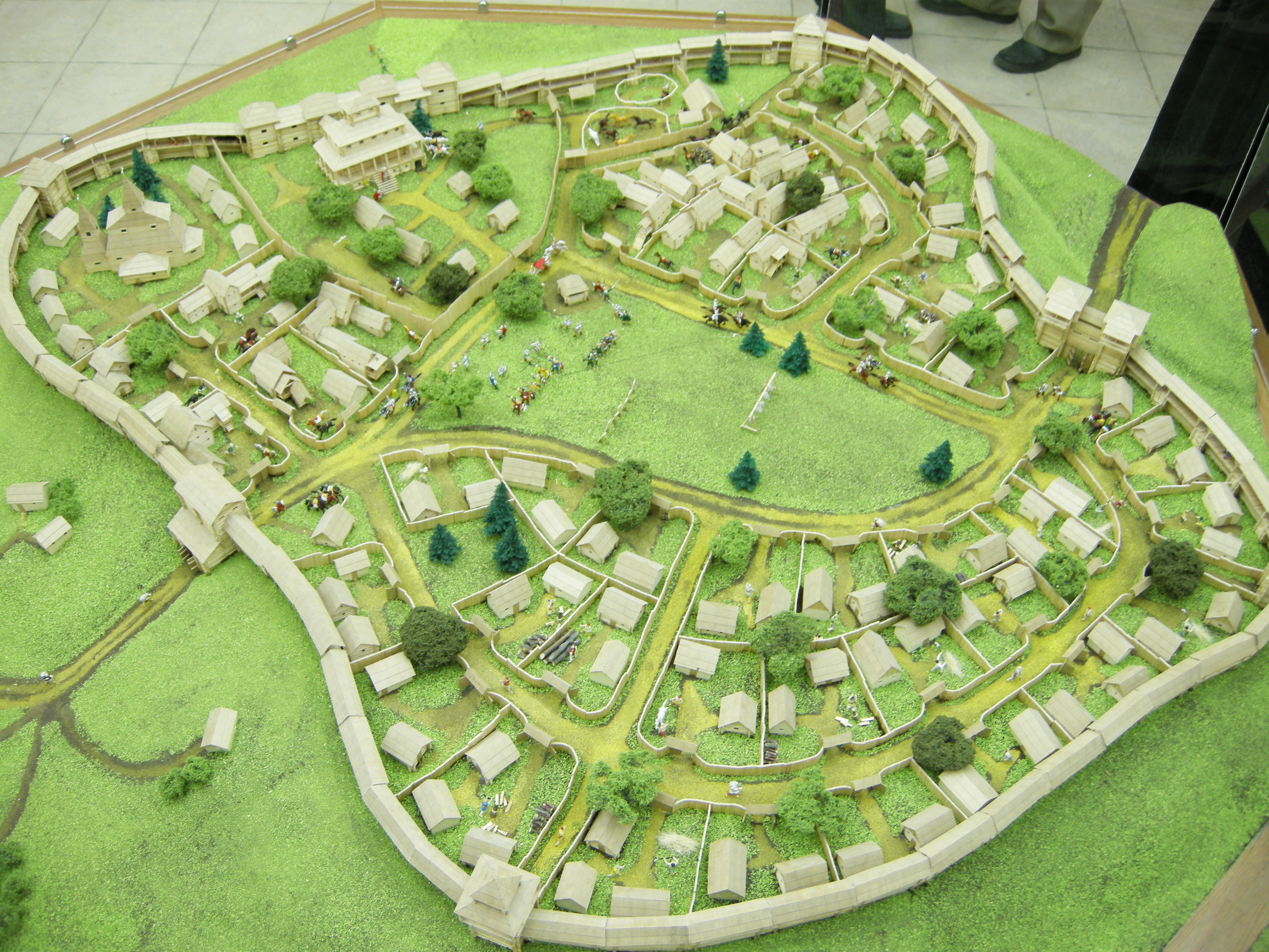 Макер середньовічної Пересопниці.